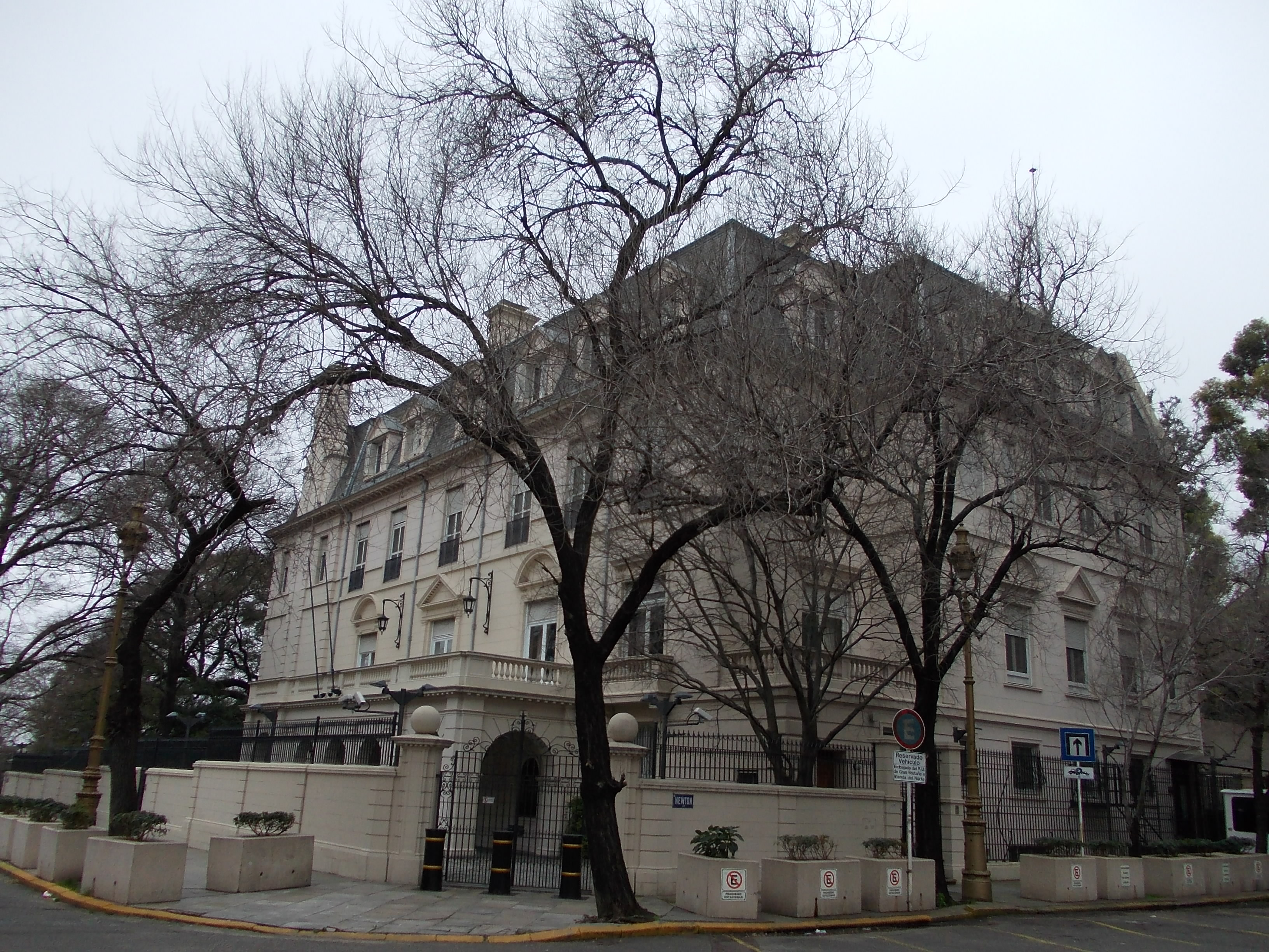 Embajada del Reino Unido de Gran Bretaña e Irlanda del Norte